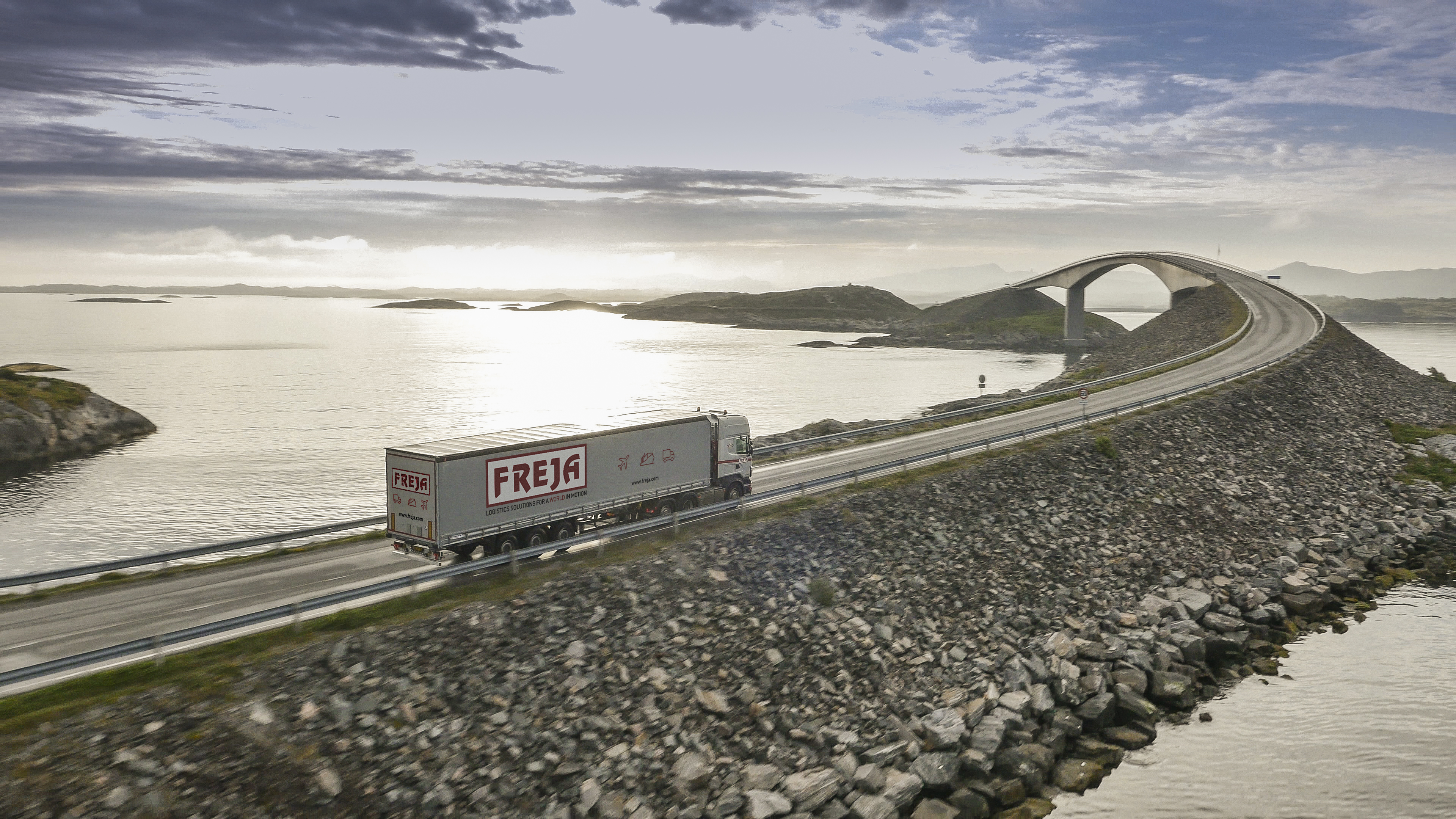 FREJA tarjoaa kansainvälisiä maantiekuljetuksia. Palveluvalikoimaan kuuluvat myös meri- ja lentorahdit.